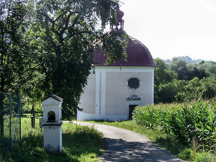 Filialkirche St. Peter in Liedering, Gunskirchen